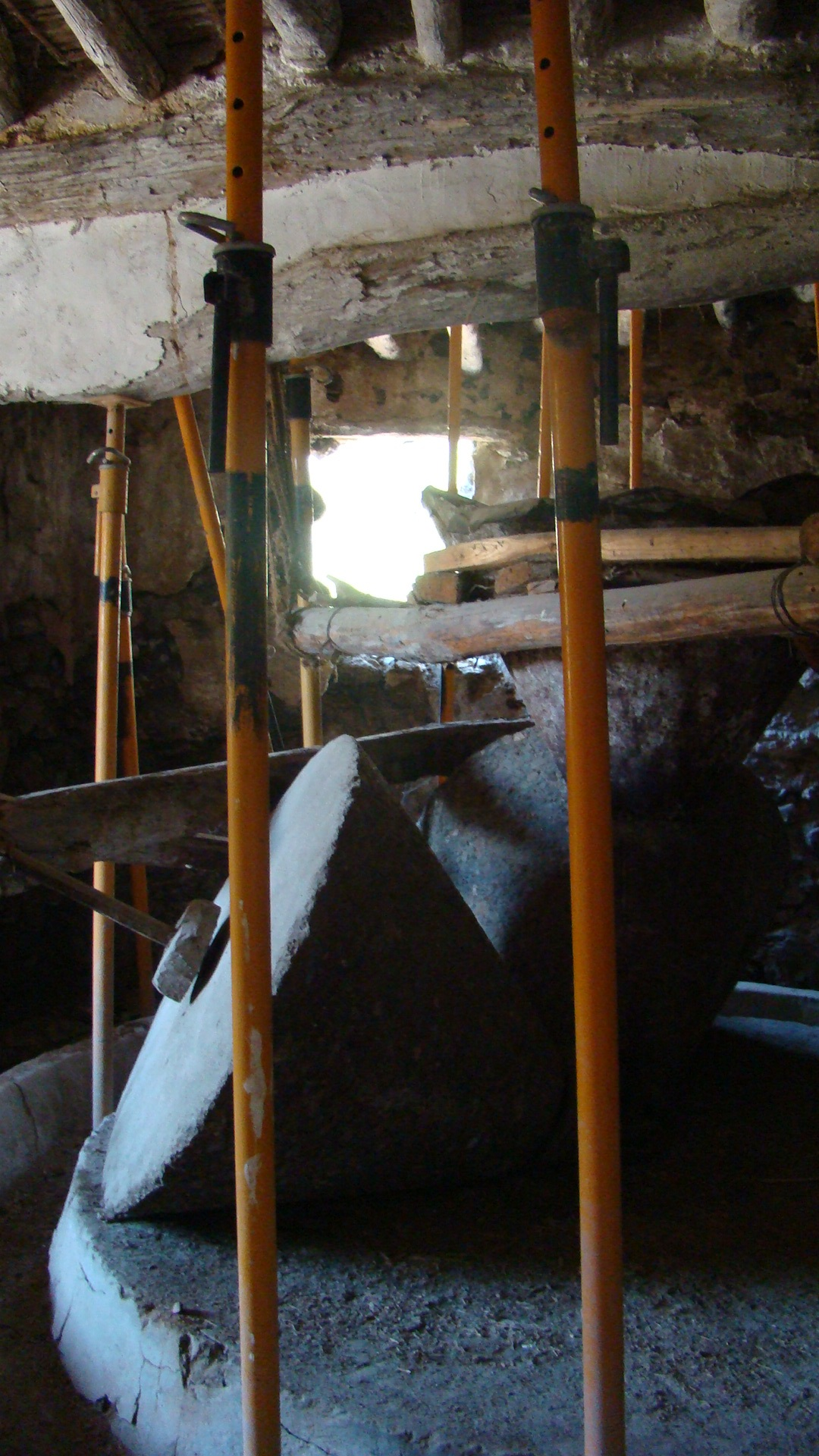 Almazara en rehabilitacion